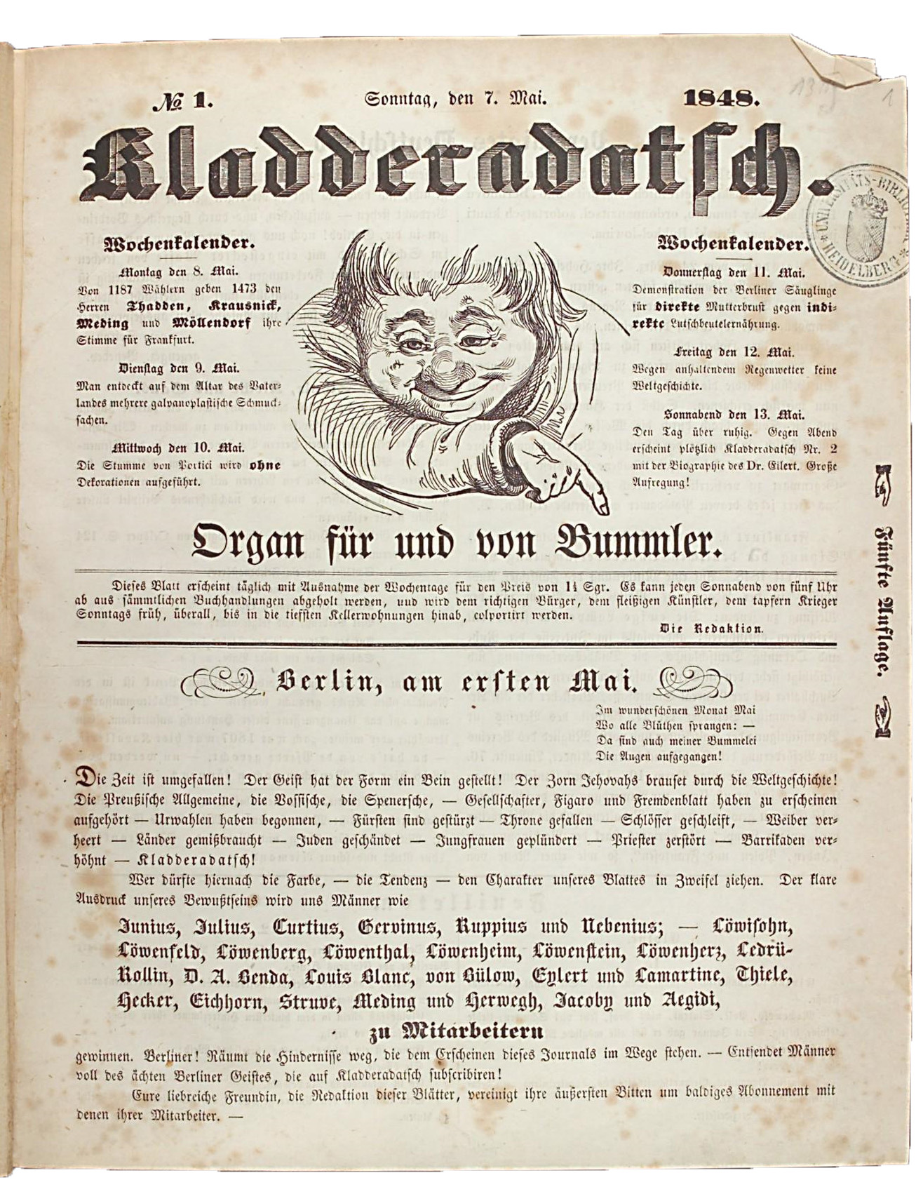 Die erste, vollständig von David Kalisch verfasste erste Ausgabe Ausgabe der Satirezeitschrift Kladderadatsch vom 7. Mai 1848.